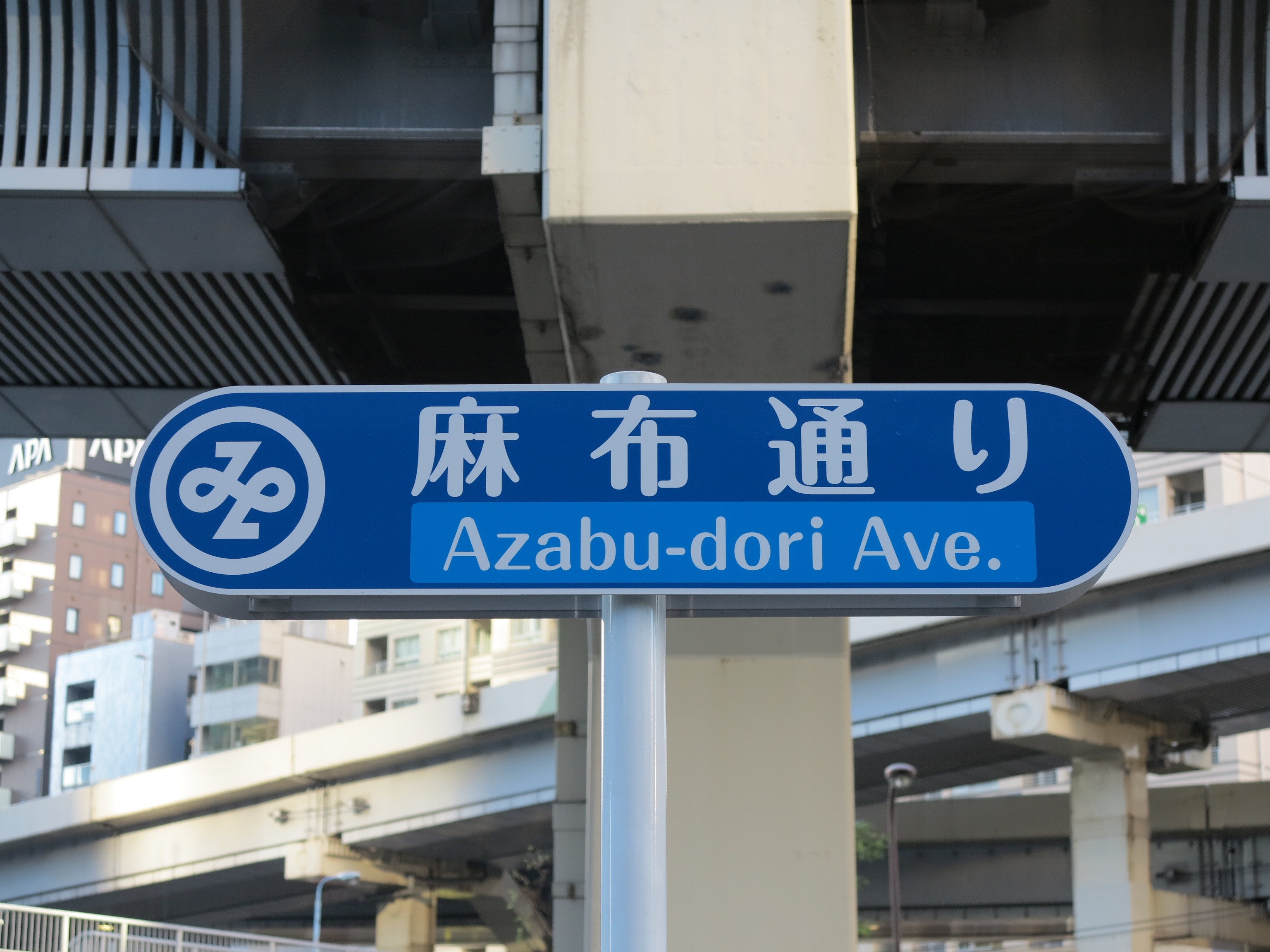 港区六本木に設置されている麻布通りの道路名表示（区設置）